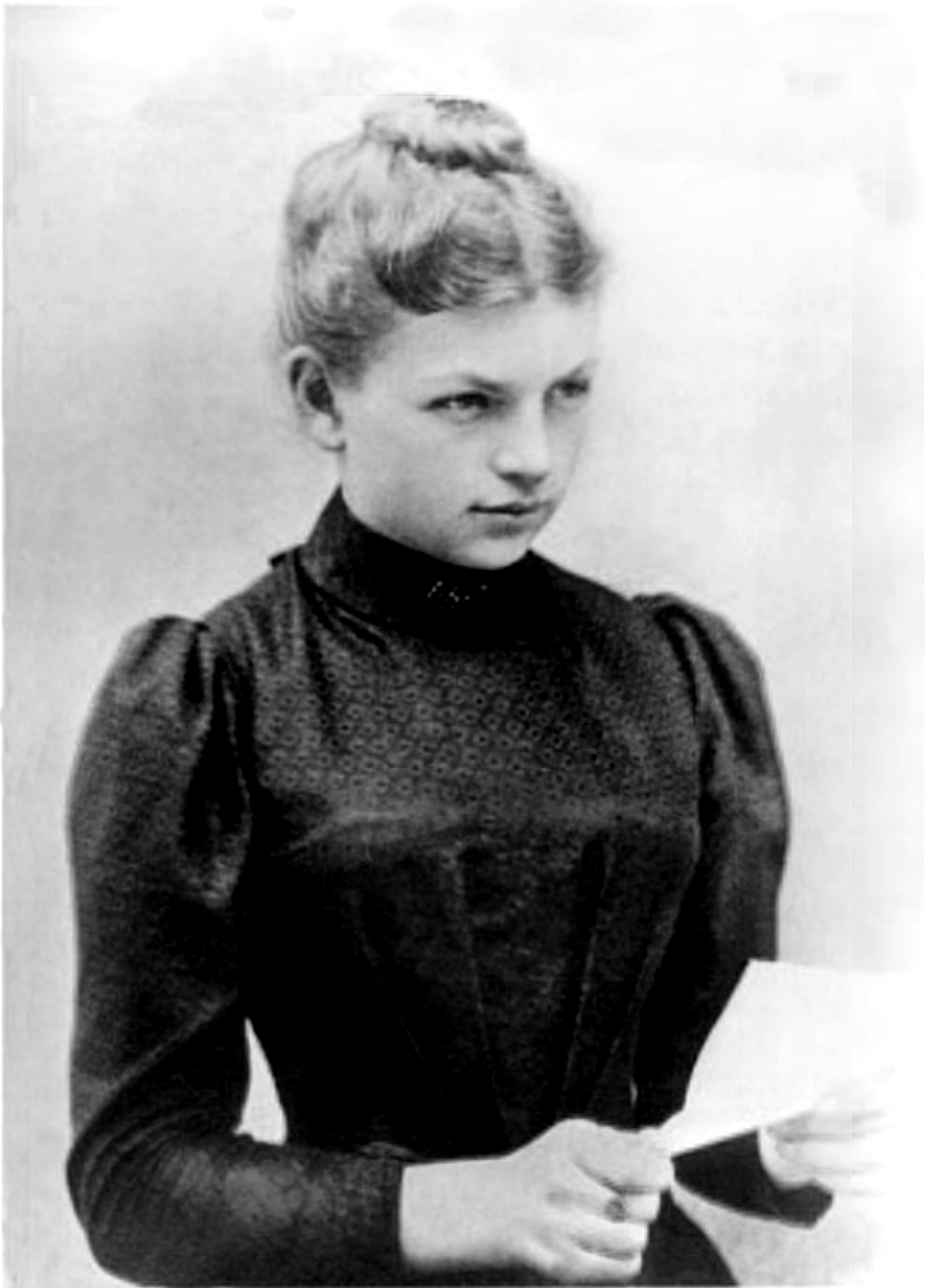 Clara Immerwahr (* 21. Juni 1870 in Polkendorf bei Breslau; † 2. Mai 1915 in Dahlem bei Berlin) während des Studiums